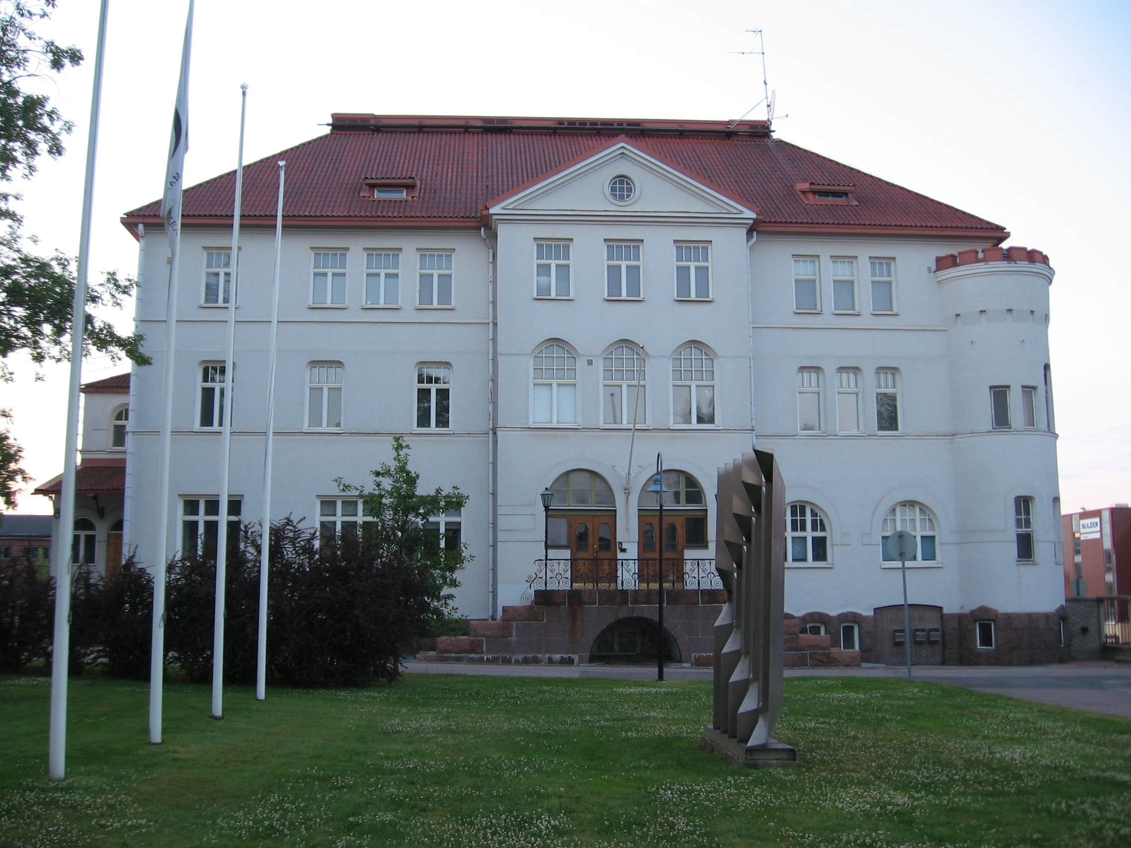 Karhula Oy:n pääkonttori Kotkassa.